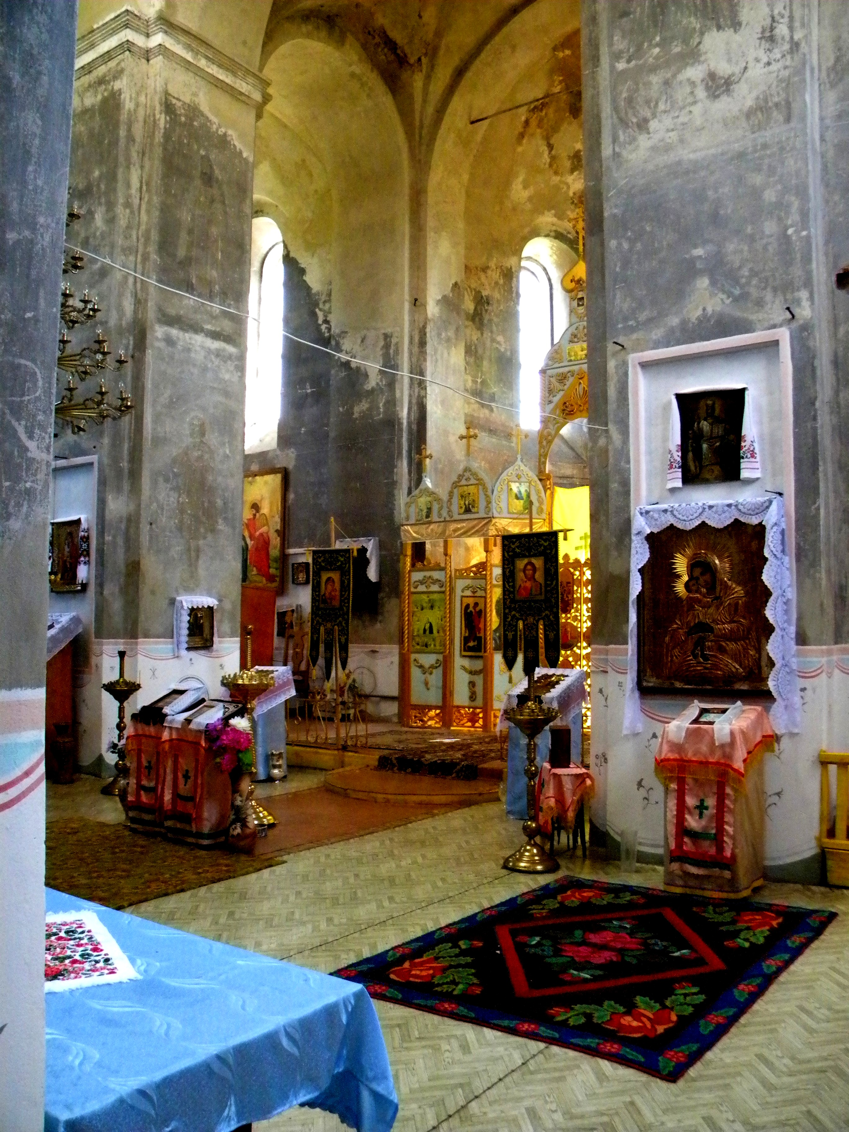 Современный интерьер храма Рождества Христова в селе Уланок Суджанского района Курской области